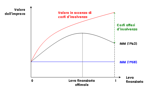 Illustrazione dell'argomentazione di Modigliani e Miller (1963) sulla relazione tra leva finanziaria, benefici fiscali del debito, e costi attesi d'insolvenza.